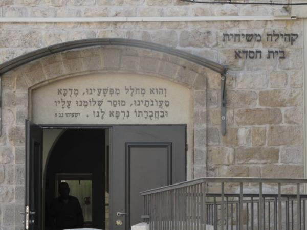 ב-1926 הגיע לחיפה, מניו זילנד המסיונר קלאפהם(J. W. Clapham), התיישב בטחנת הקמח הישנה במושבה הגרמנית (כיום אלנבי 58), והפך אותה לבית קהילת היהודים המשיחיים("בית חסדא"). א. אנגלהרדט, מעשירי העיר תמך בקהילה, ששיפצה את המבנה (ויקיפדיה)